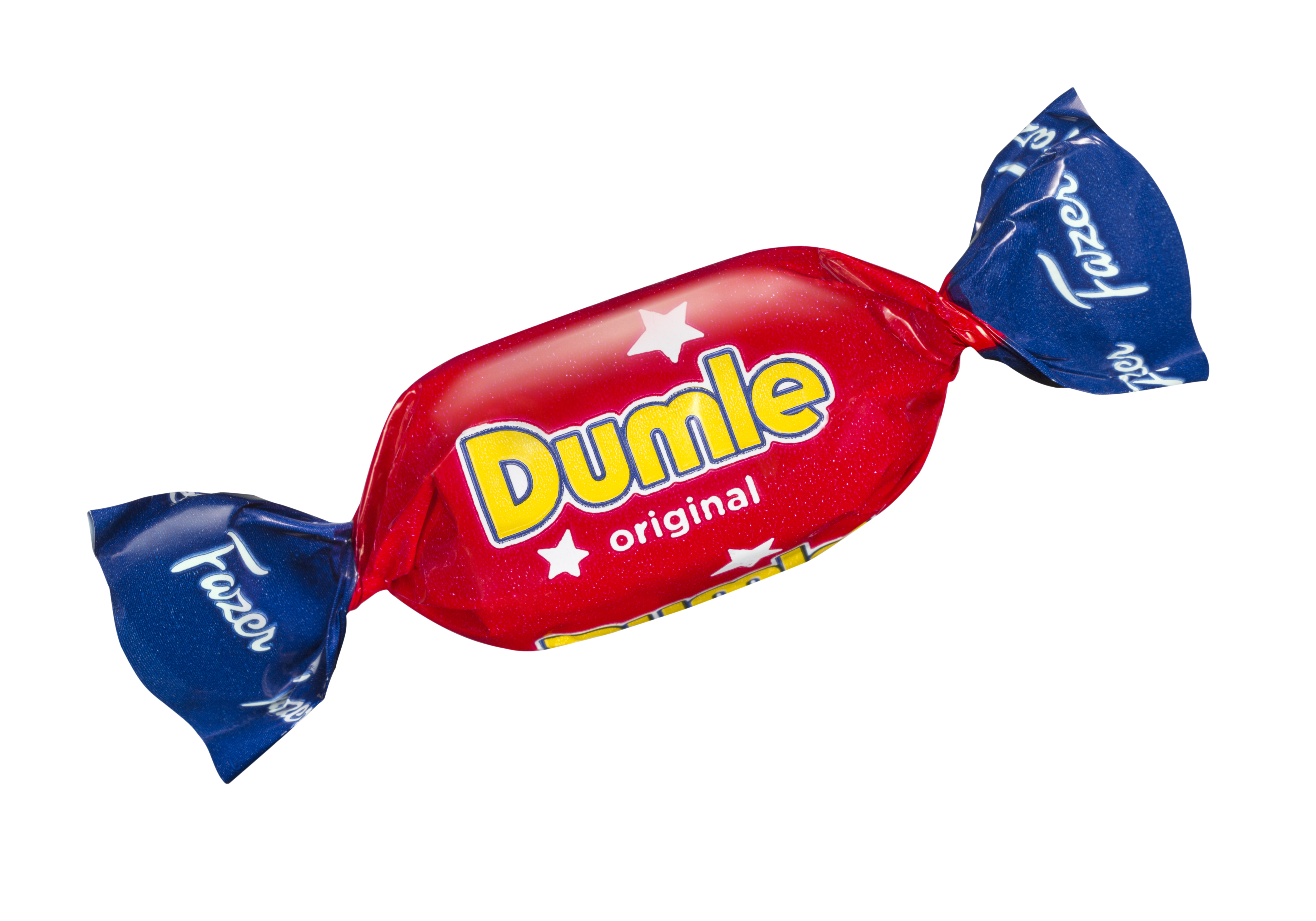 Uusi Dumle Original